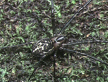 female Metleucauge chikunii from Okinawa.